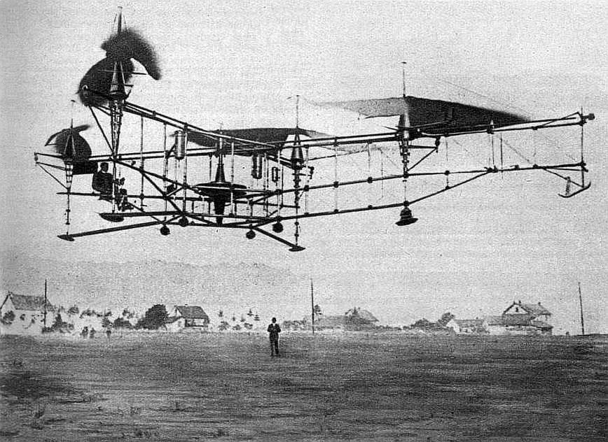 Étienne Œhmichen sur l'Oehmichen Helicopter No. 2, le 4 mai 1924 à Valentigney (vol d'1 km en circuit fermé).